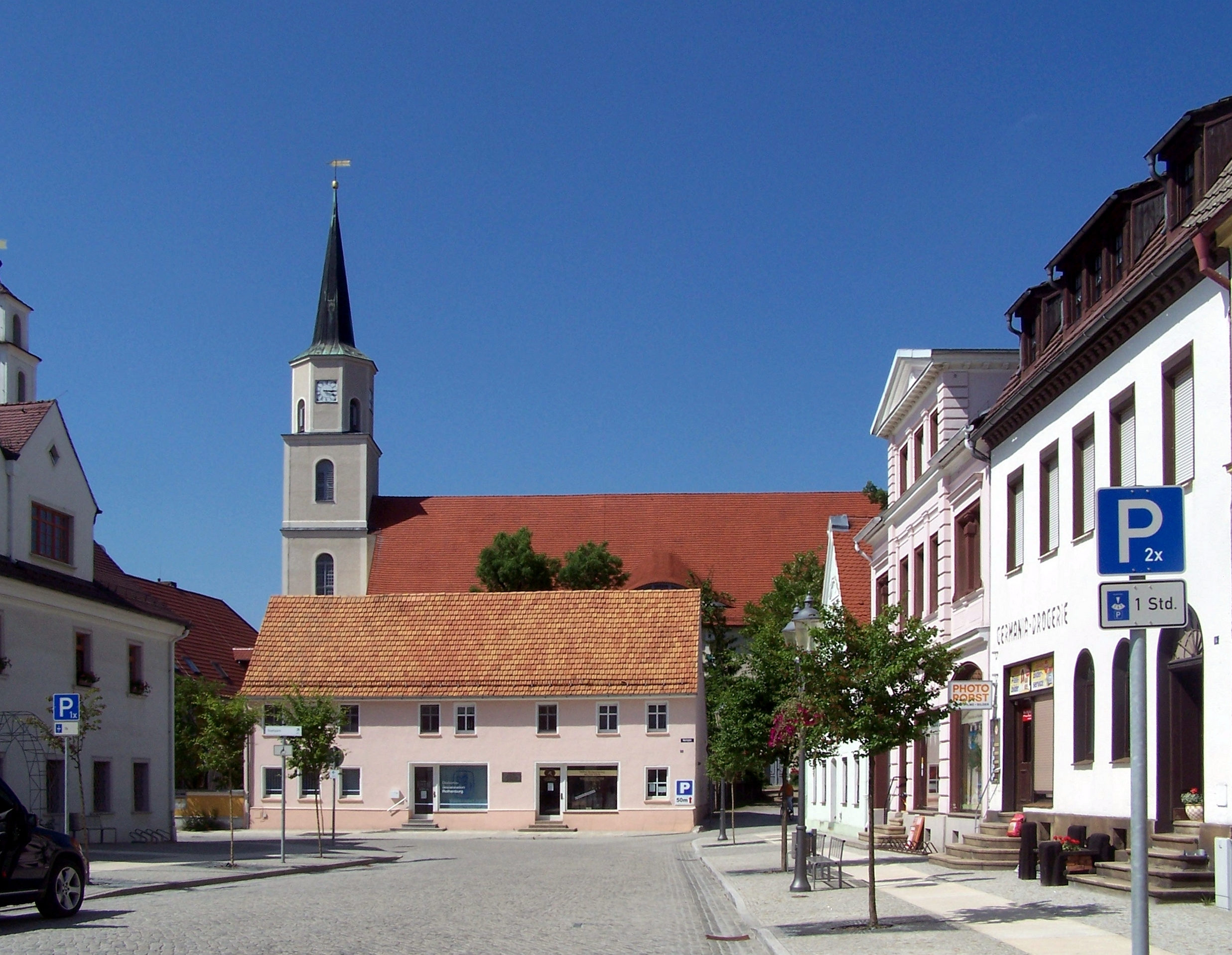 Evangelische Stadtkirche in Rothenburg/O.L., Landkreis Görlitz